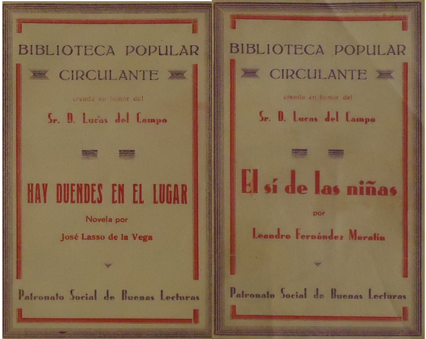 Ejemplares de la Biblioteca Popular dedicada a Lucas del Campo Fernández